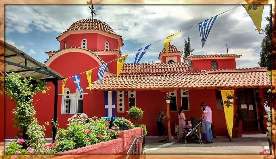 Η εκκλησία της Αγίας Κυριακής